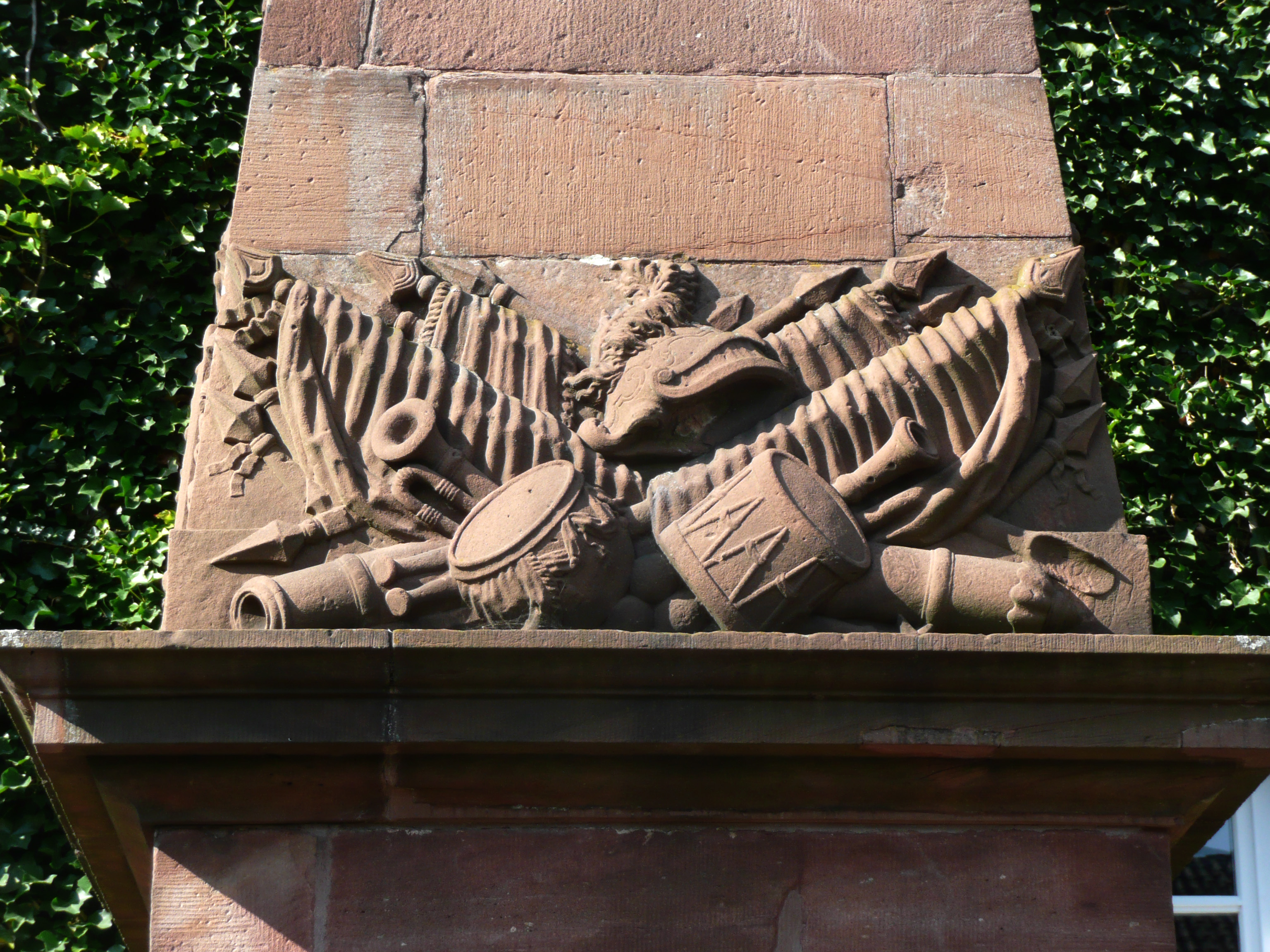 Detail aus dem Friedenstein von 1762 im Hof des ehemaligen Brücker Wirtshauses in Amöneburg, Mittelhessen. Ansicht von S. Siehe hierzu die Schlacht an der Brücker Mühle. This is a photograph of an architectural monument.